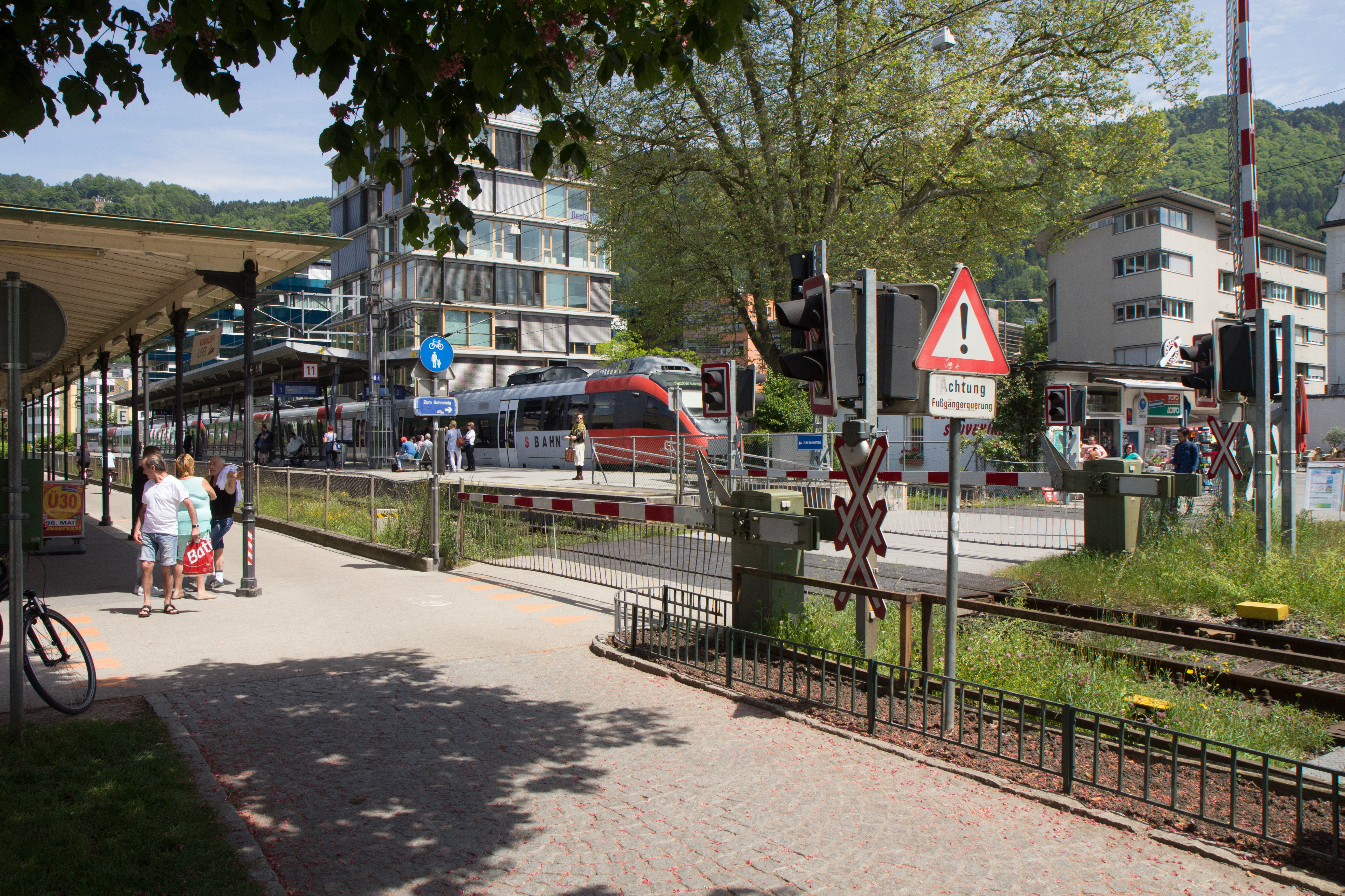 Bahnhof Bregenz Hafen